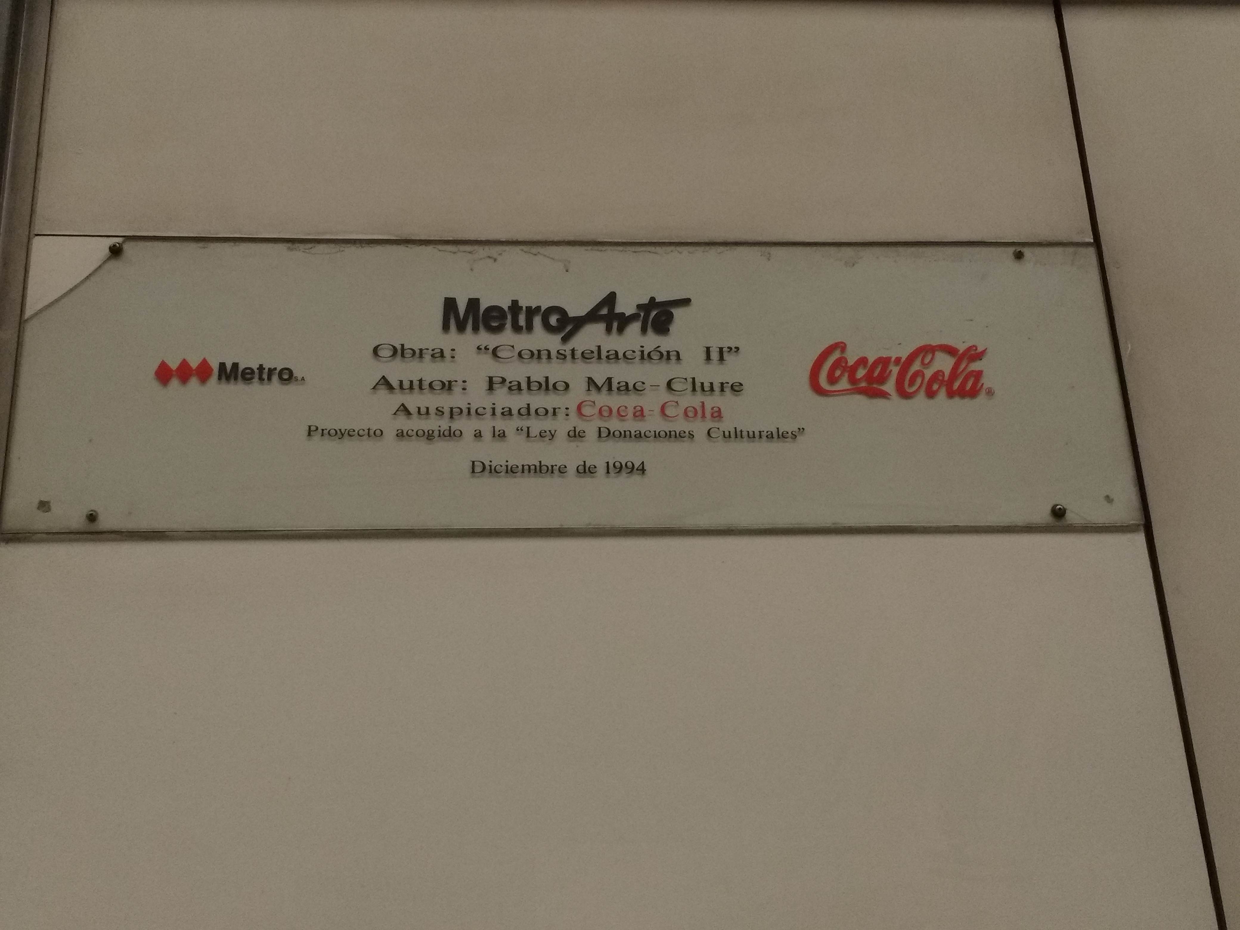 Placa con la descripción de la obra de Pablo Mc-Clure Constelación II